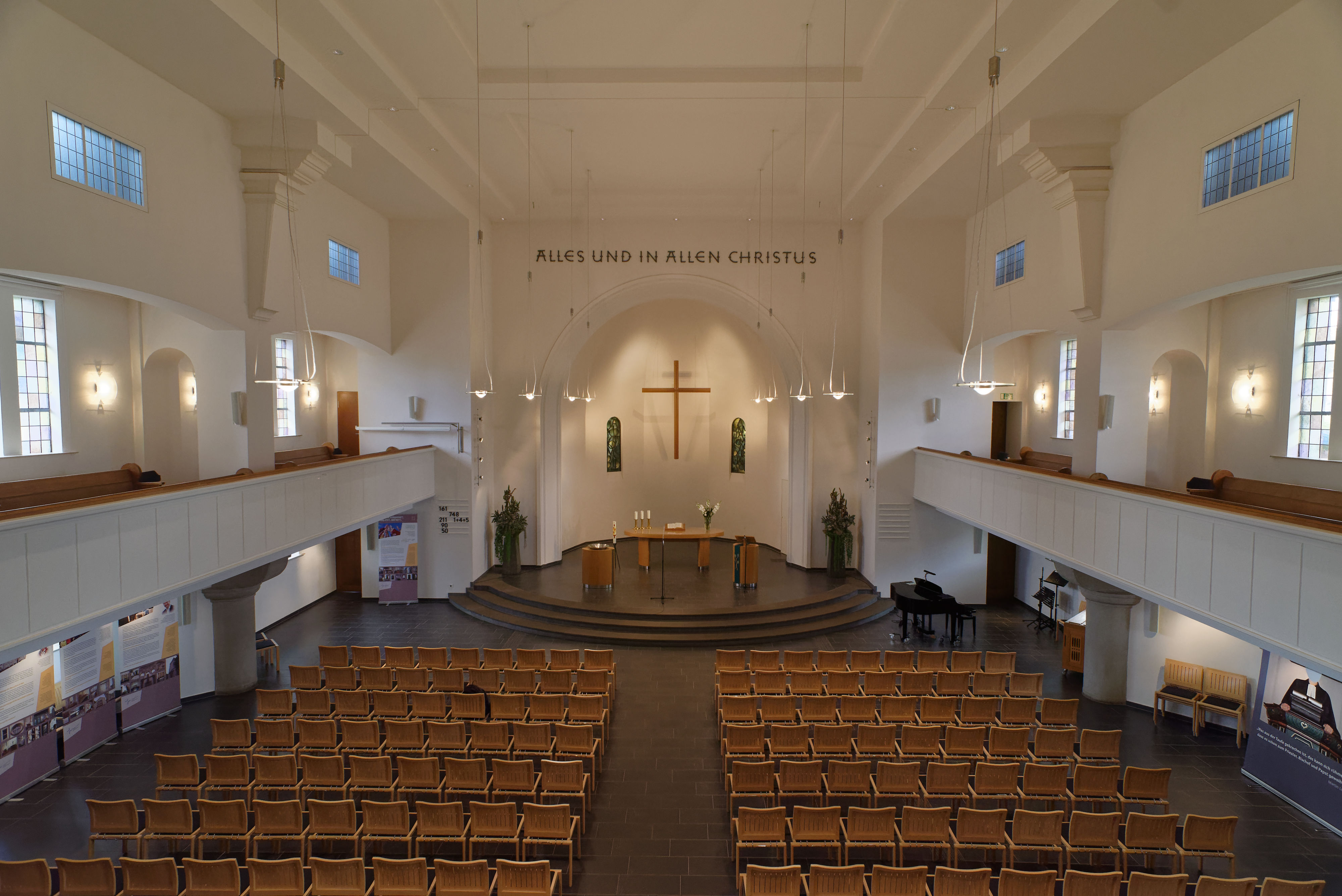 Dorper Kirche Solingen, Innenraum